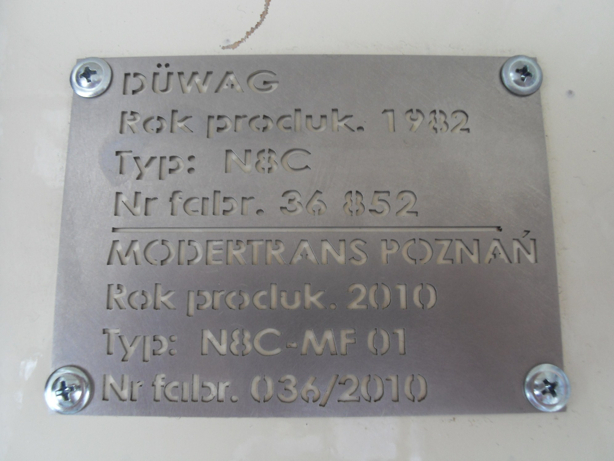 Moderus Beta w Gdańsku - tabliczka znamionowa (na kabinie motorniczego).